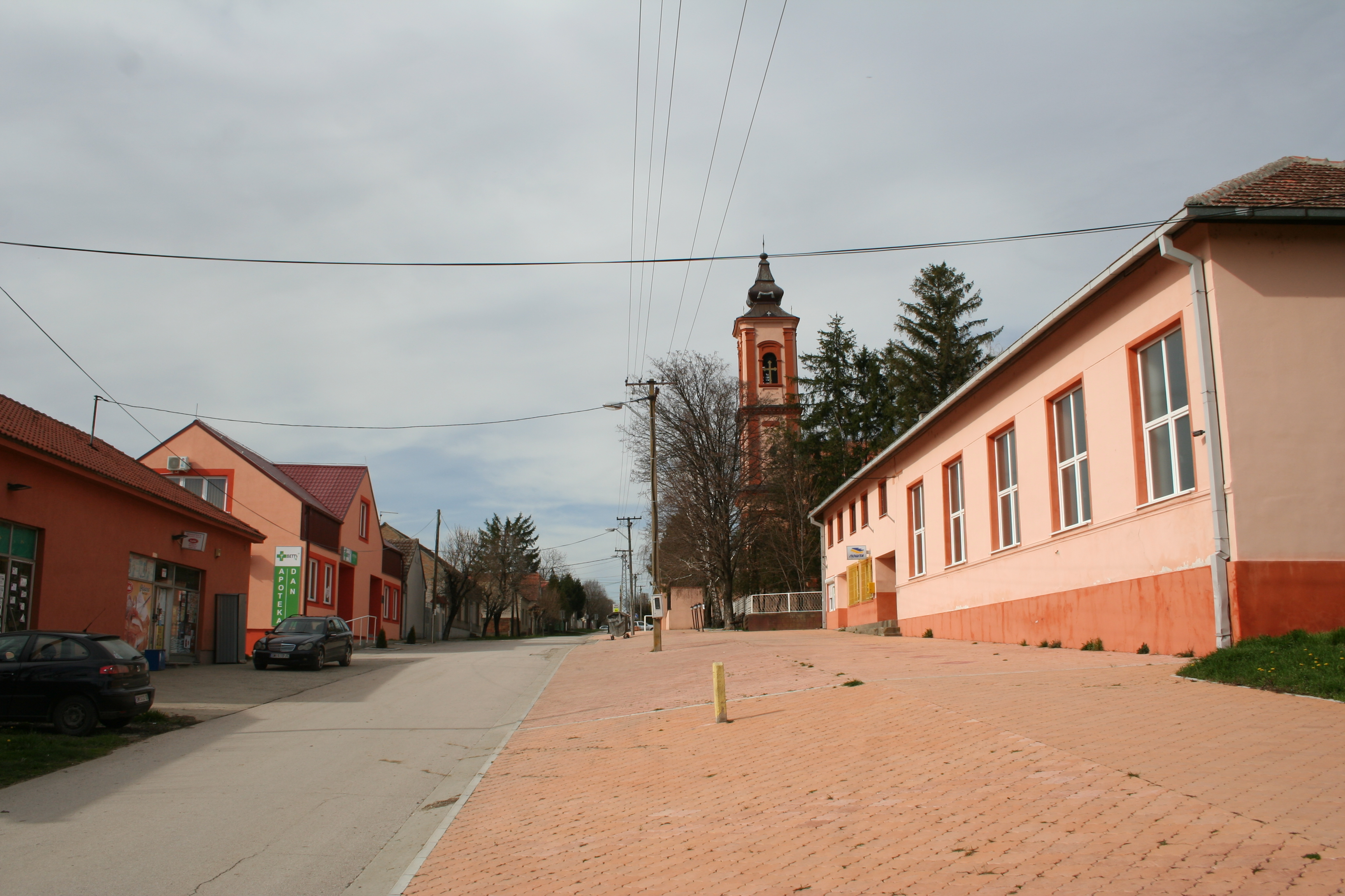 Crkva Sv. Georgija (Manđelos)